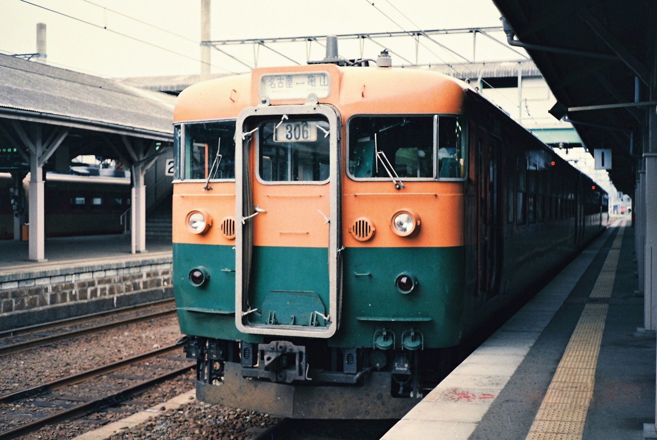 165系による関西本線普通列車（亀山駅、1987年8月撮影）